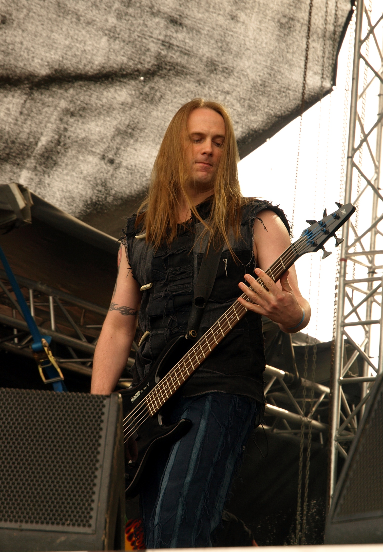 Metsatöll live am Myötätuulirock 2011